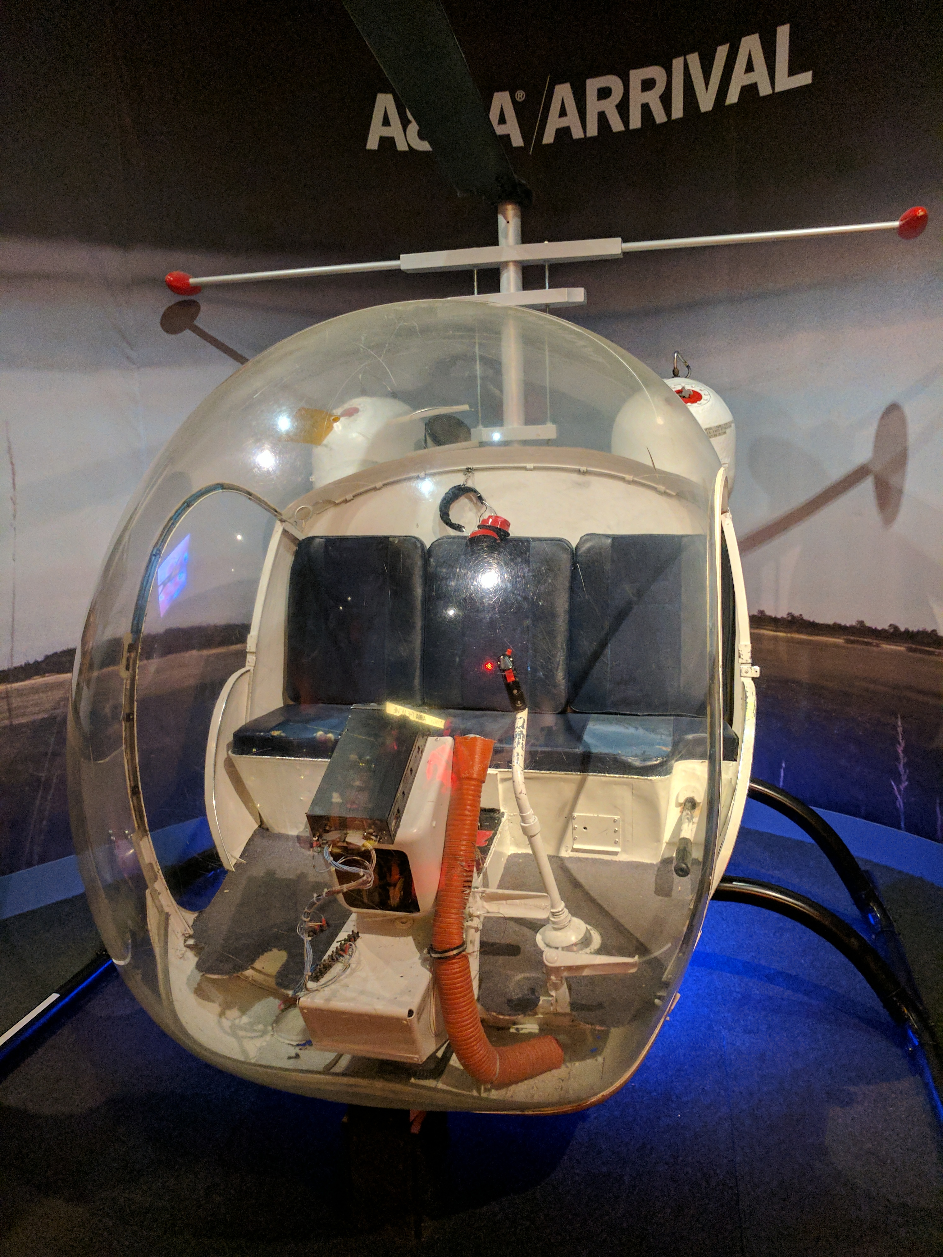 ABBA the Museum 2017-05-06 - picture 01